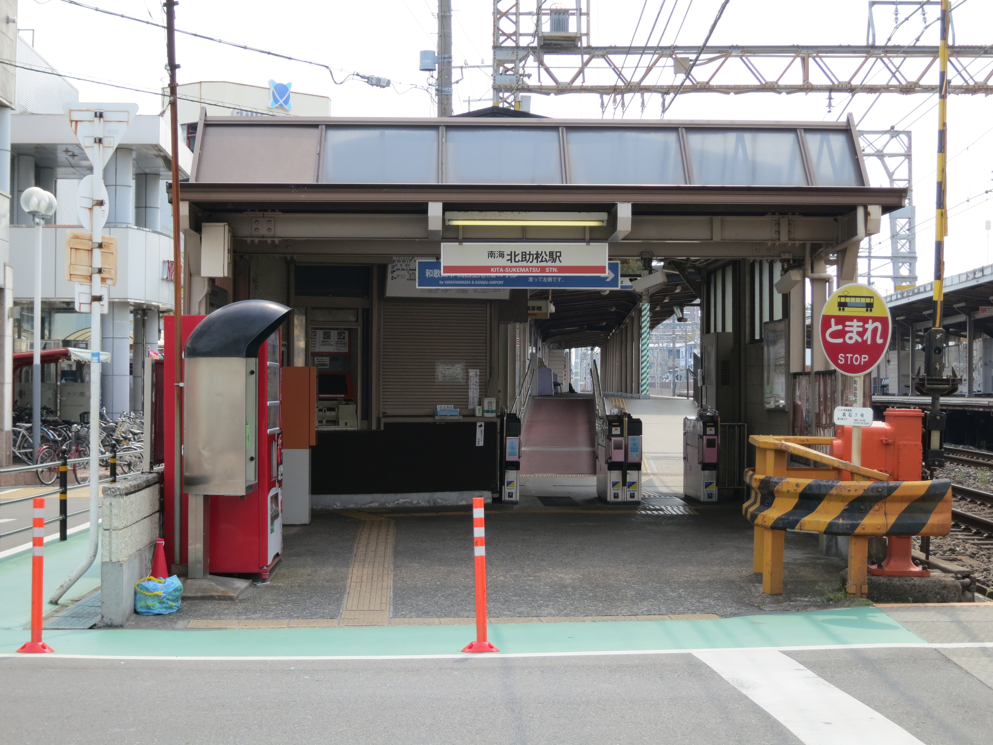 南海北助松駅(和歌山市方面) Canon PowerShot S100